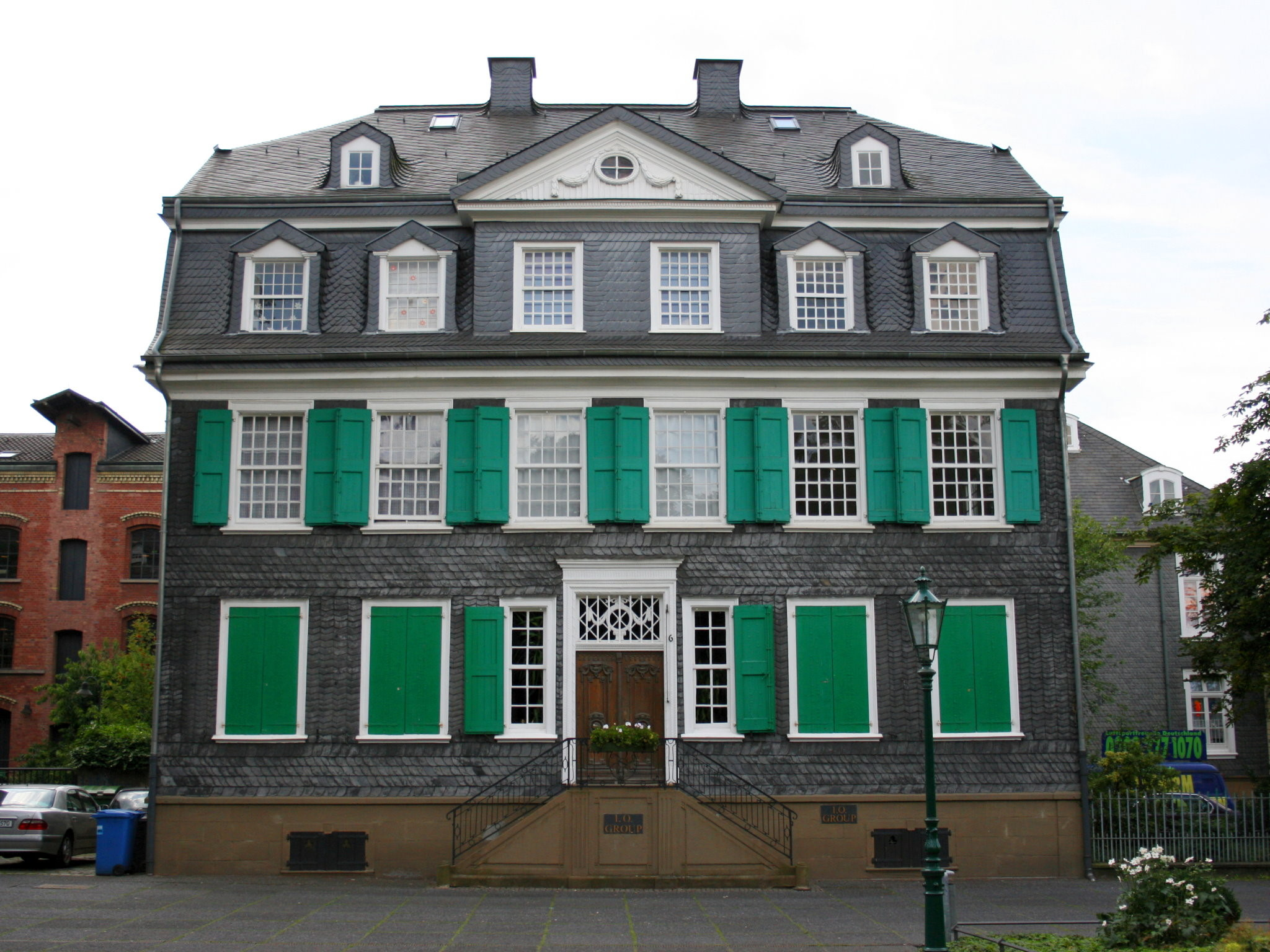 Haus Röhrig im Historischen Zentrum, Wuppertal